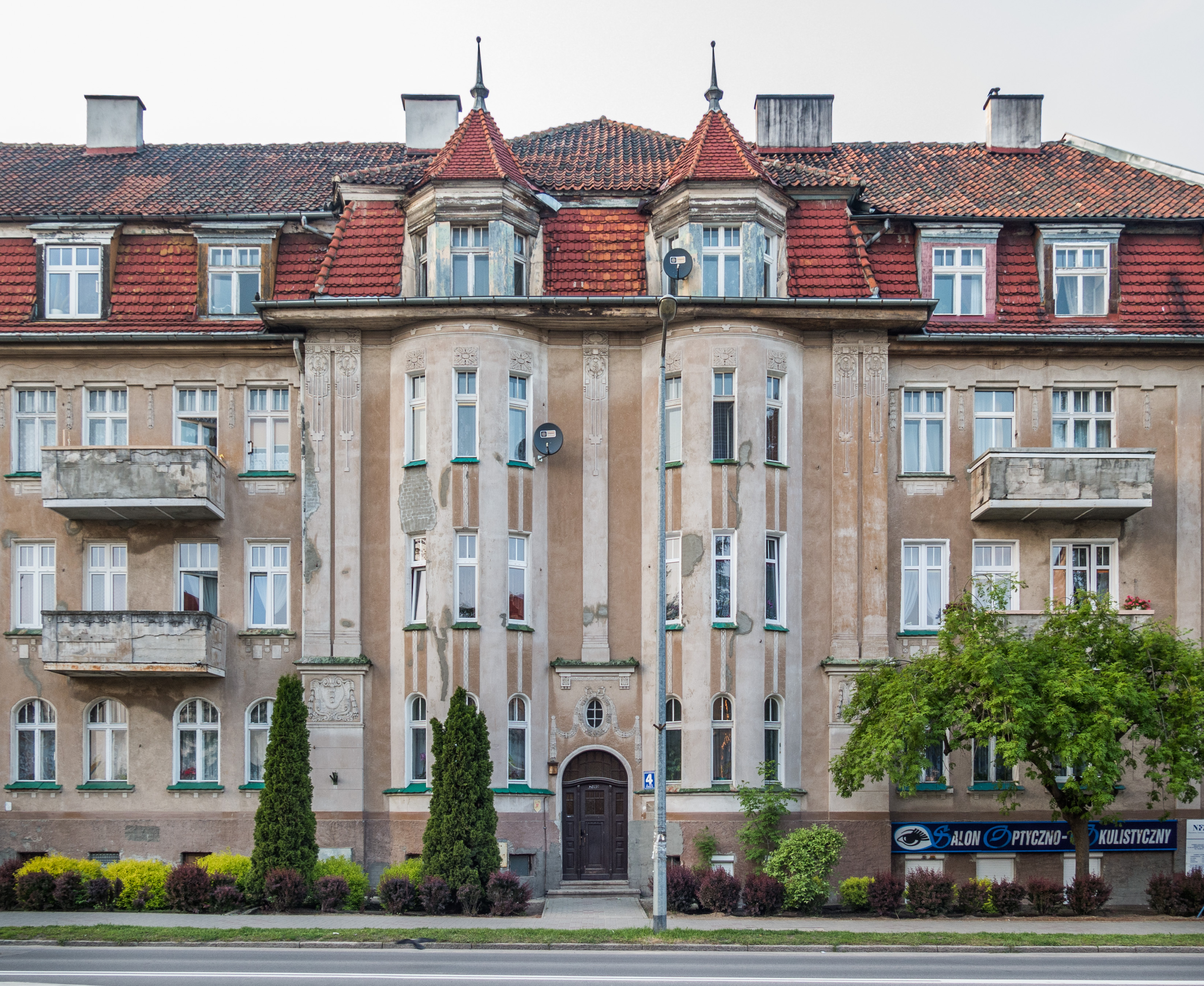 Secesyjna kamienica przy ul. Jana Pawła II 4 w Ostródzie.